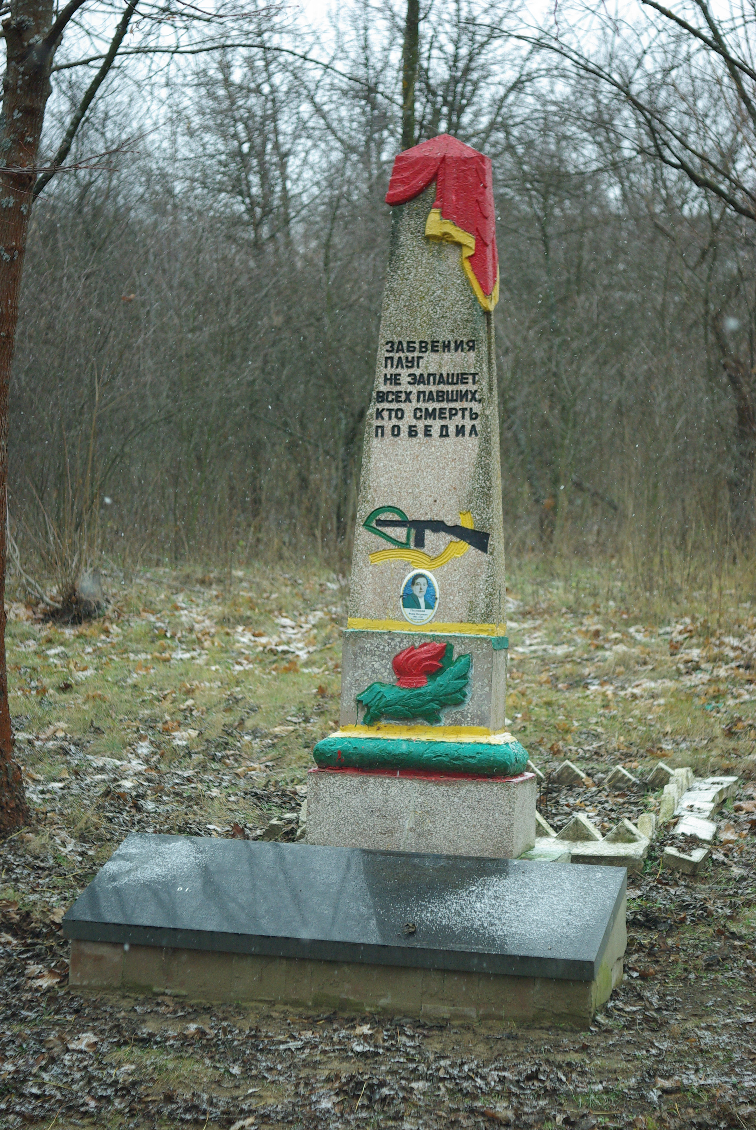 Братська могила радянських воїнів., Синичено